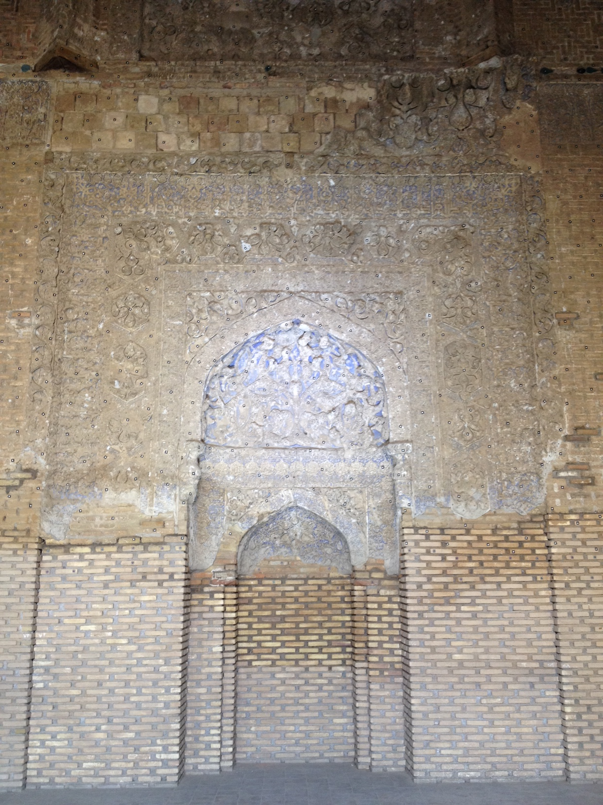 مدرسه حیدریه